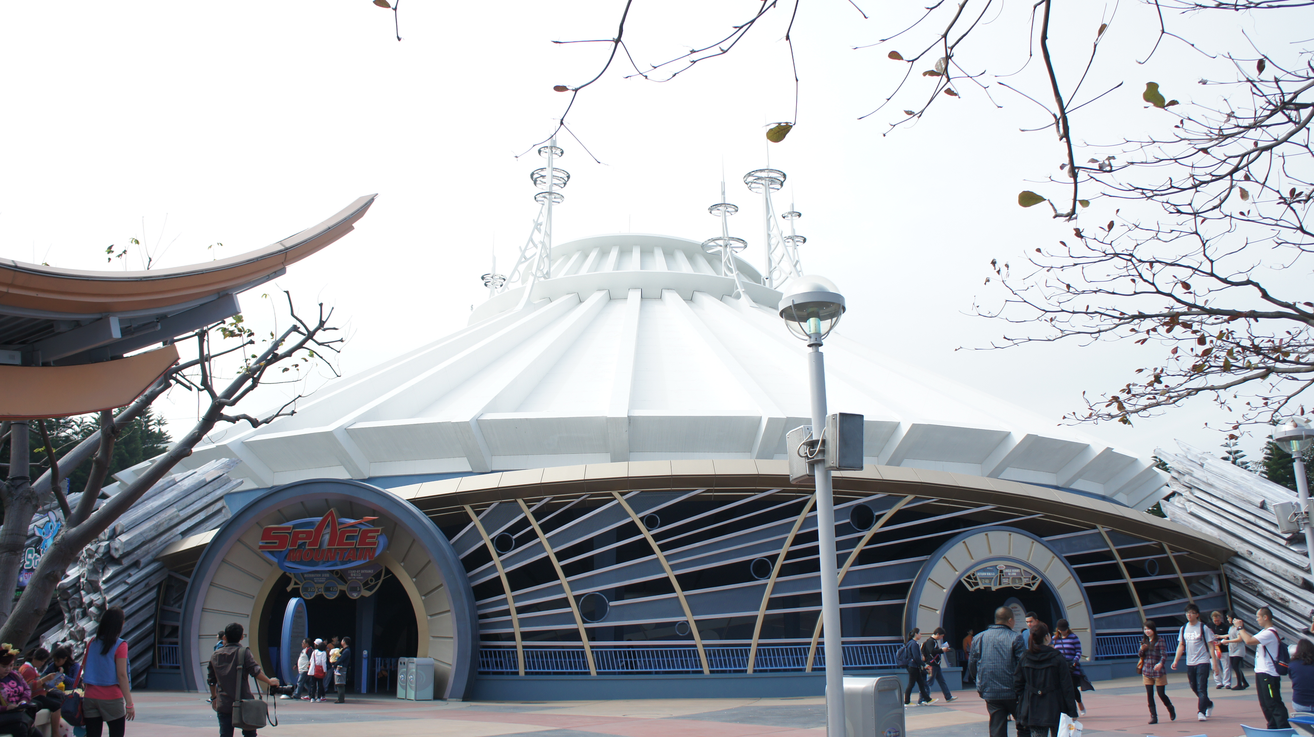 中文（香港）: 飛越太空山（HK）